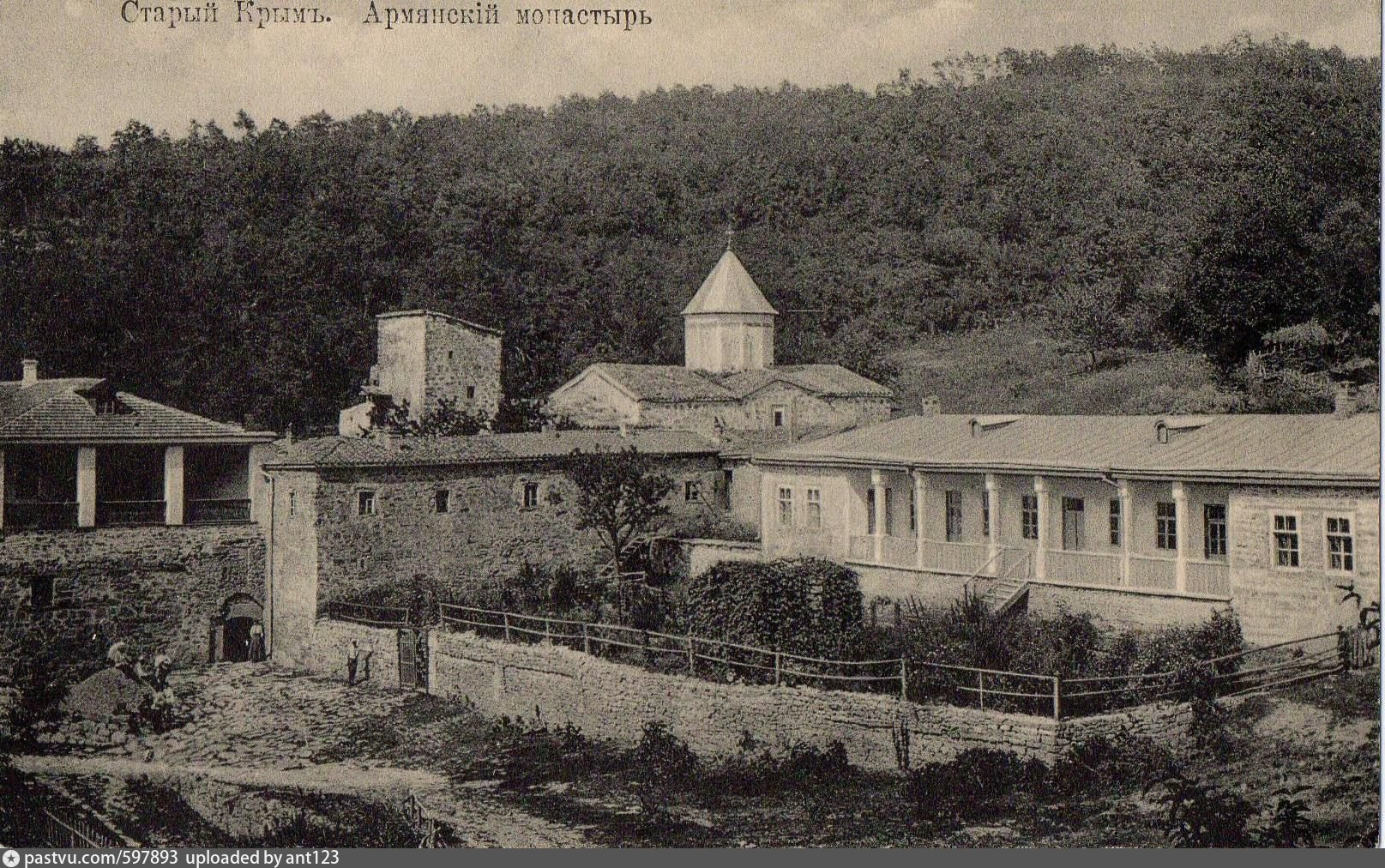 Монастырь Сурб-Хач (Старый Крым)